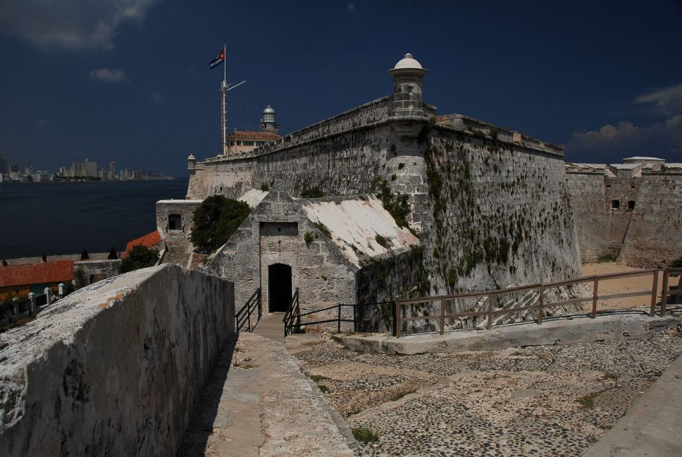 Cuba, augustus 2006, info in de Metadata